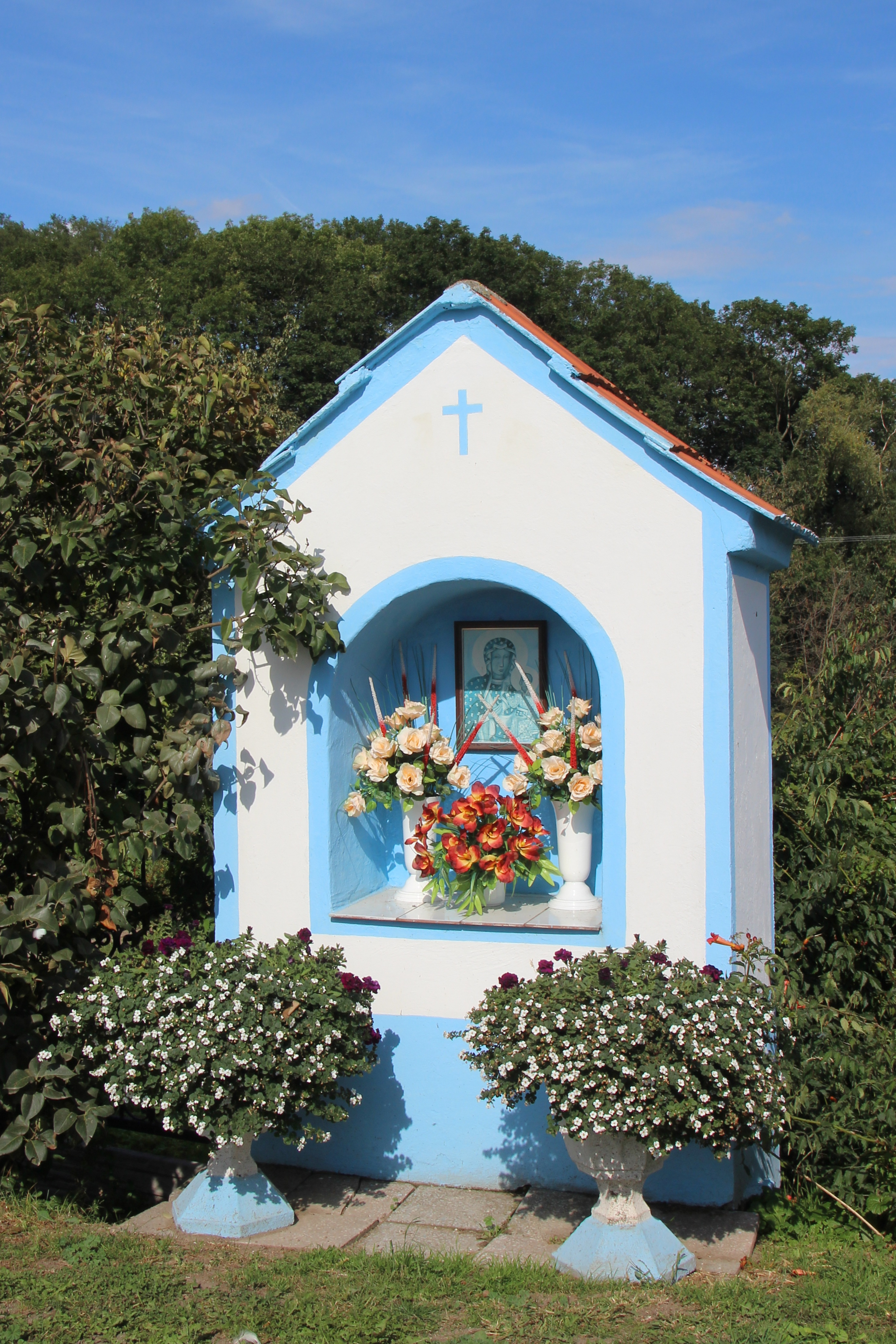 Goraszowice – wieś w Polsce położona w województwie opolskim, w powiecie nyskim, w gminie Otmuchów.